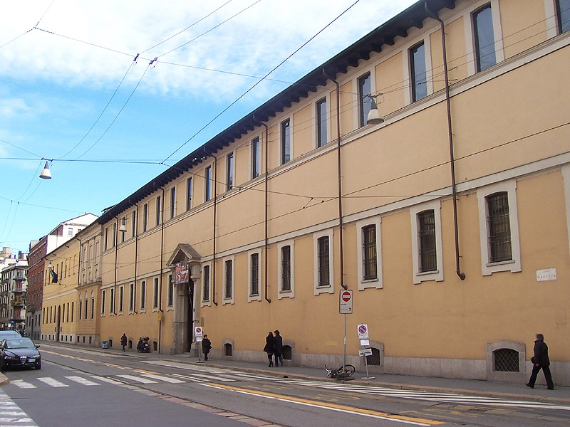 Milano - Palazzo delle Stelline